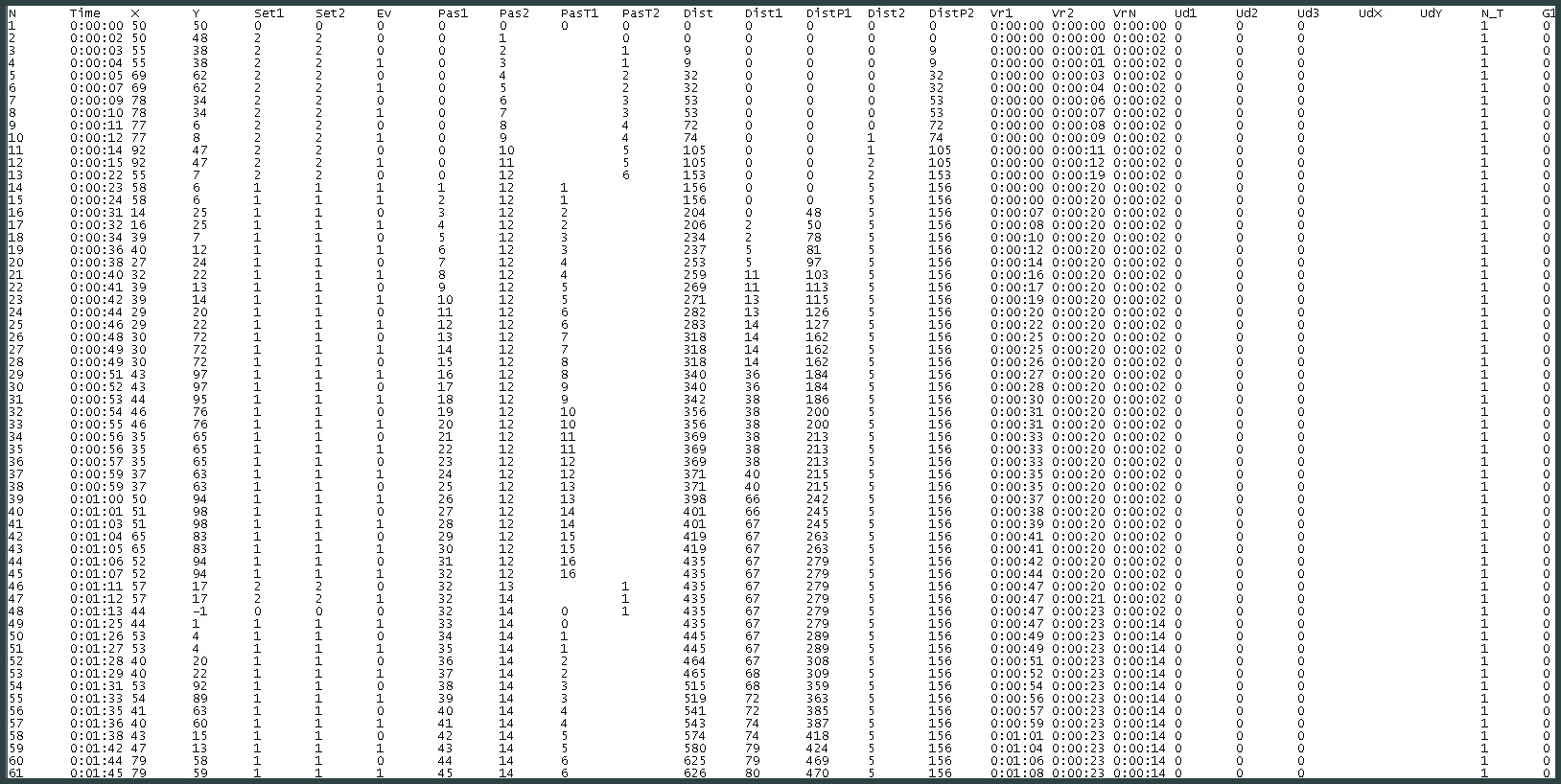 Реестр футбольного матча для построения теплограмм и аналитики матча. Аналогичные реестры использовались для информационного обеспечения при трансляциях футбольных матчей на ВГТРК.